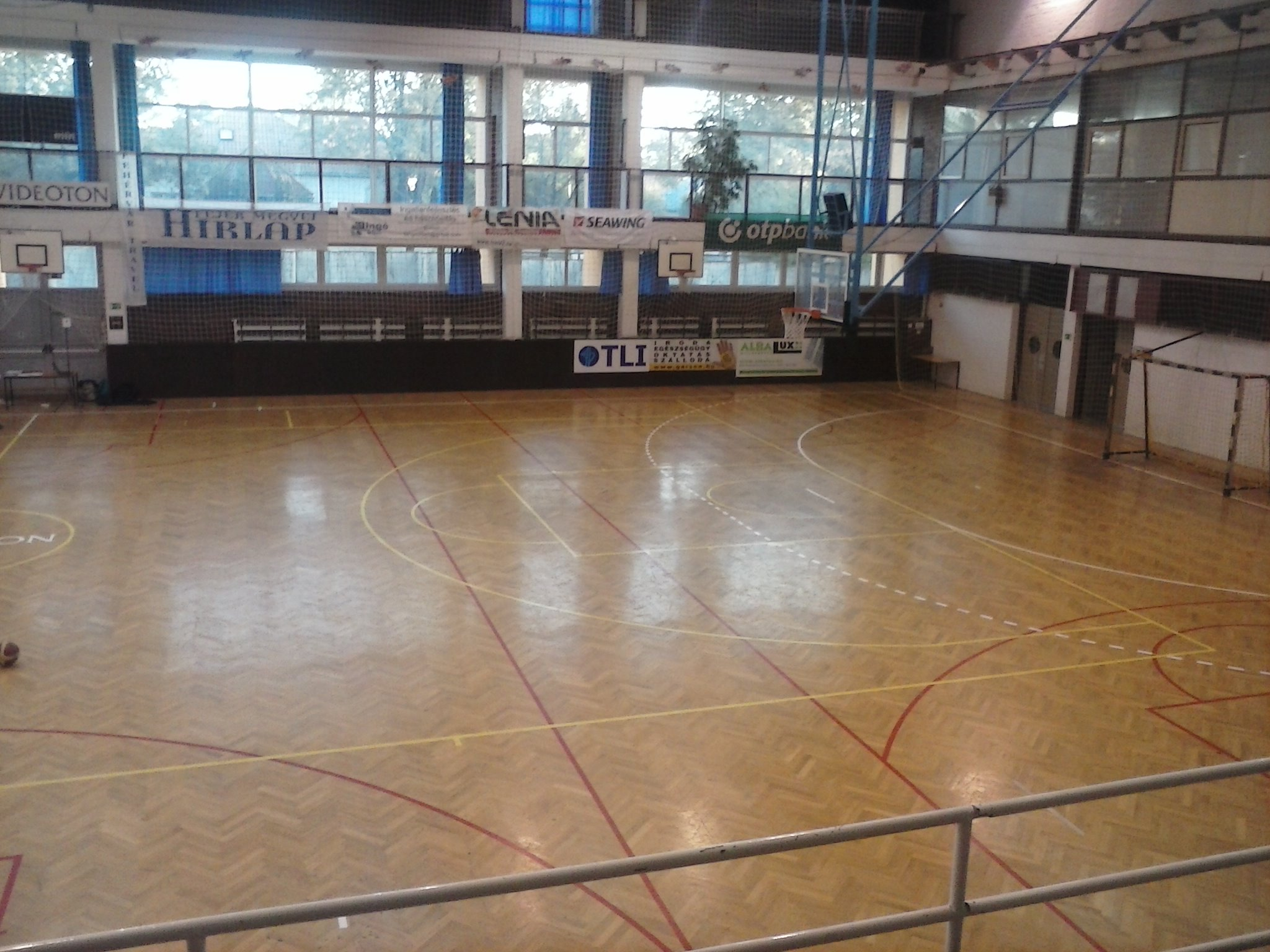 Vodafone sportcsarnok jobb oldala, Székesfehérvár